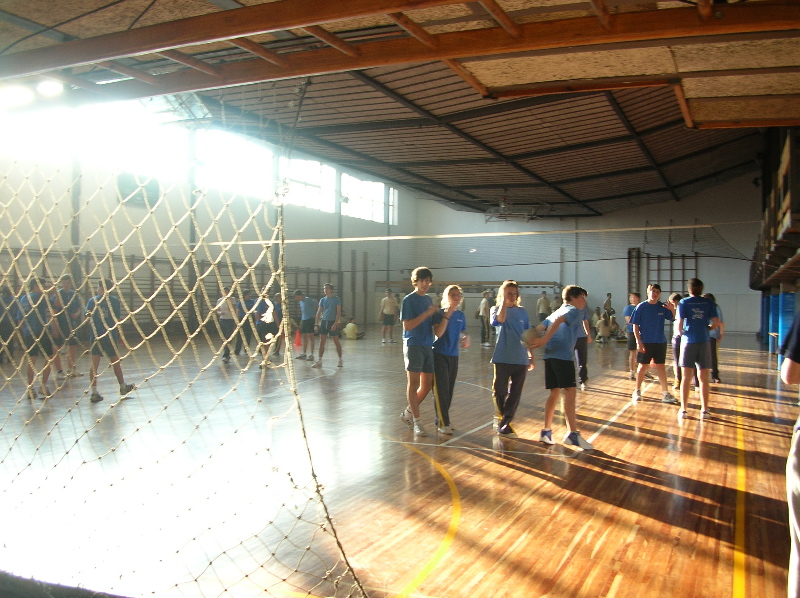 Gimnasio del Colegio de Maravillas The Interior of the Maravillas College Gynamsium by Alejandro de la Sota in Madrid